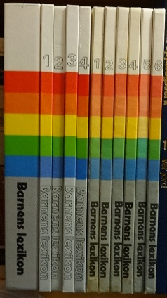 Barnens Lexikon i dess tre inbindningsvarianter